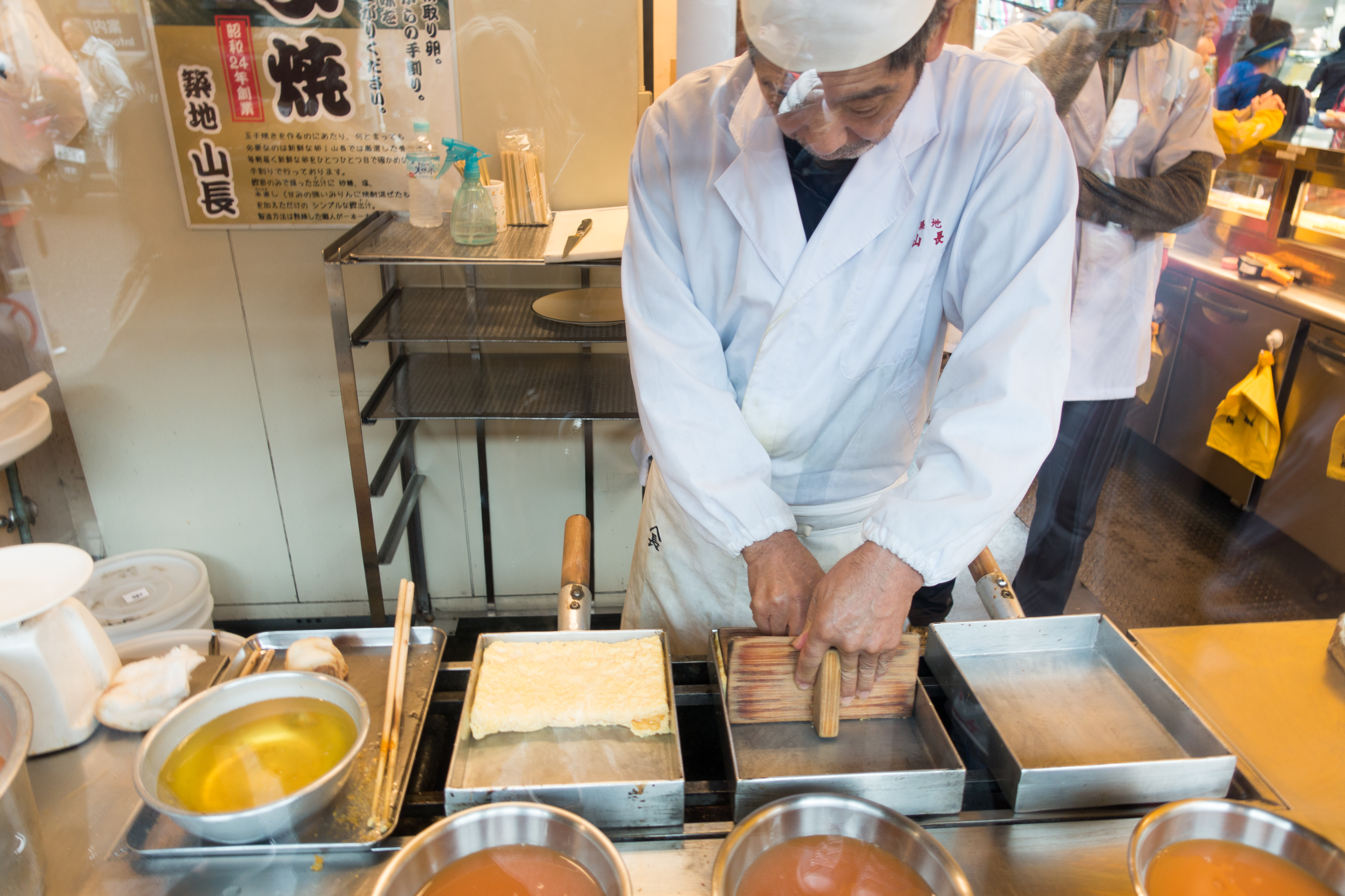 Tsukiji Market